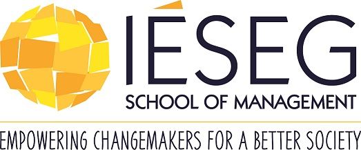 LOGO IÉSEG SCHOOL OF MANAGEMENT 2018